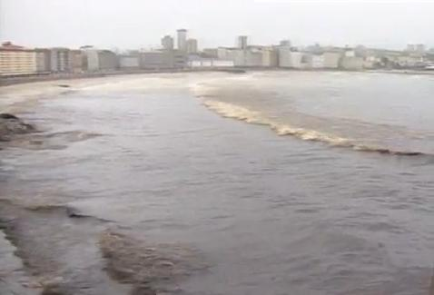 Imagen de la ensenada del Orzán, en La Coruña, España; tras la marea negra vertida por el petrolero Mar Egeo, en 1992.